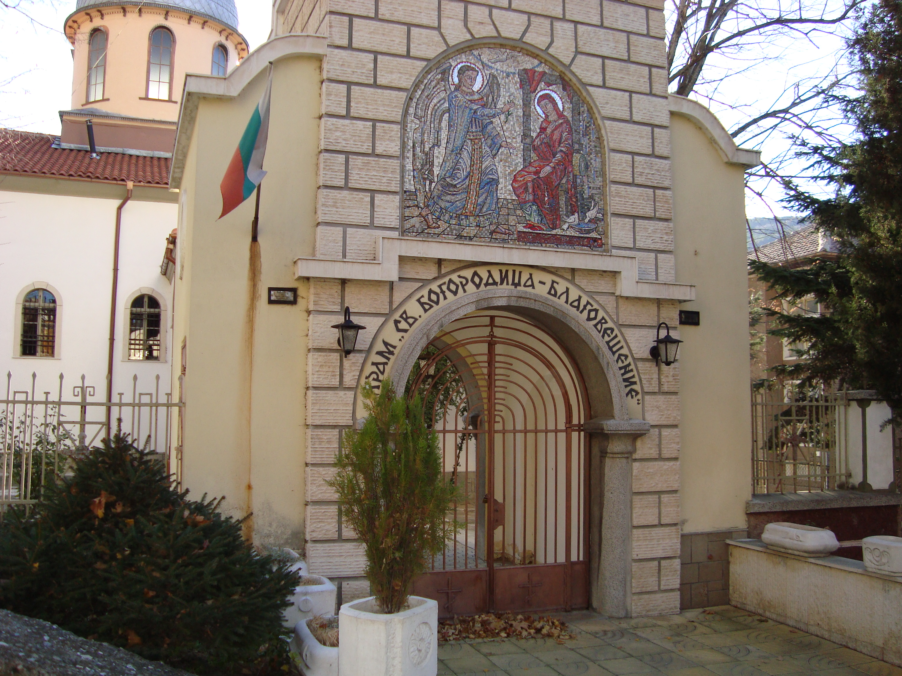 Храм "Света Богородица - Благовещение", Асеновград